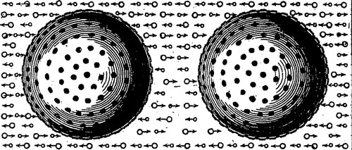 Le Sage's corpuscles